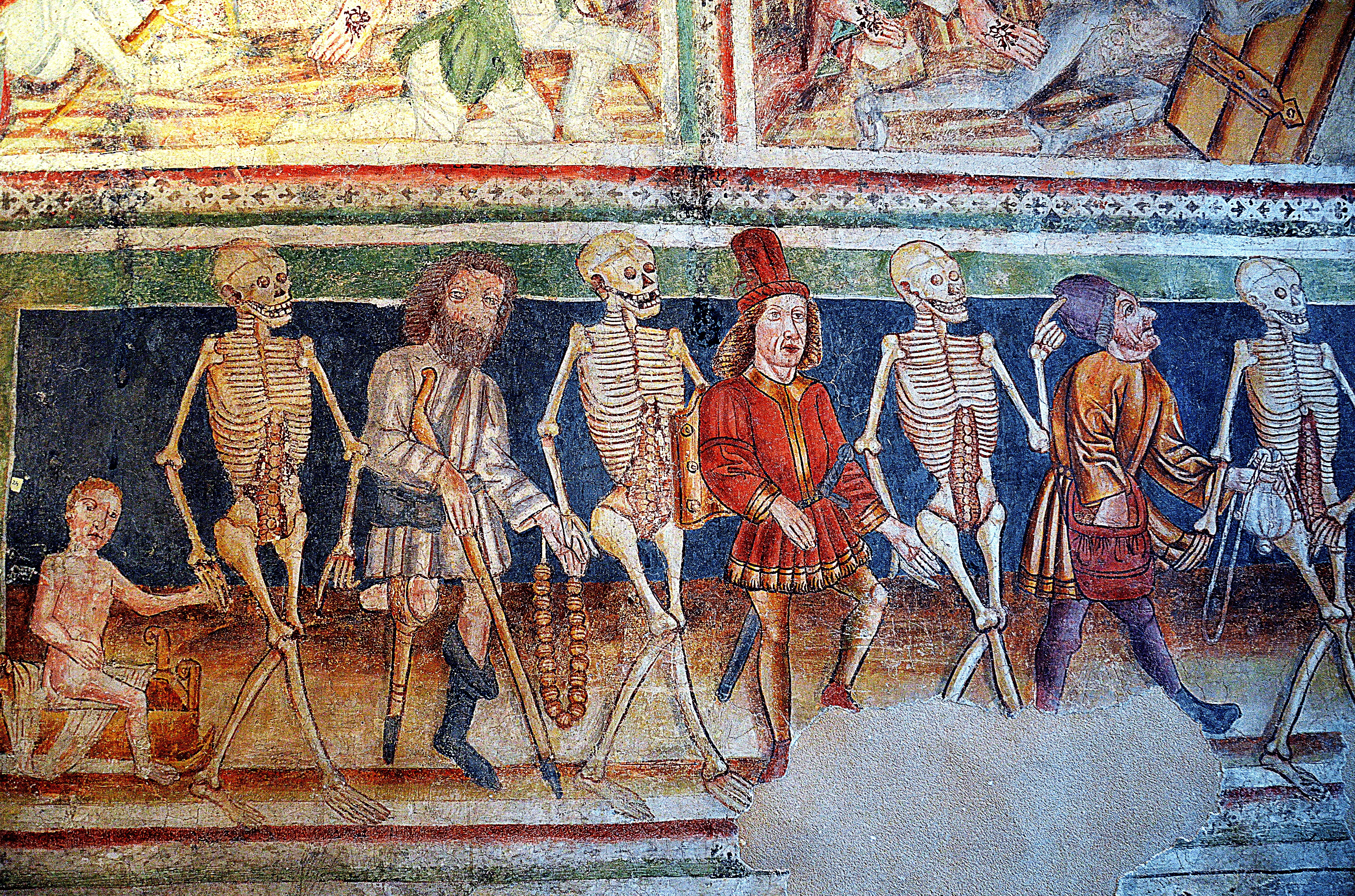 Hrastovlje - Mrtvaški ples - freska.